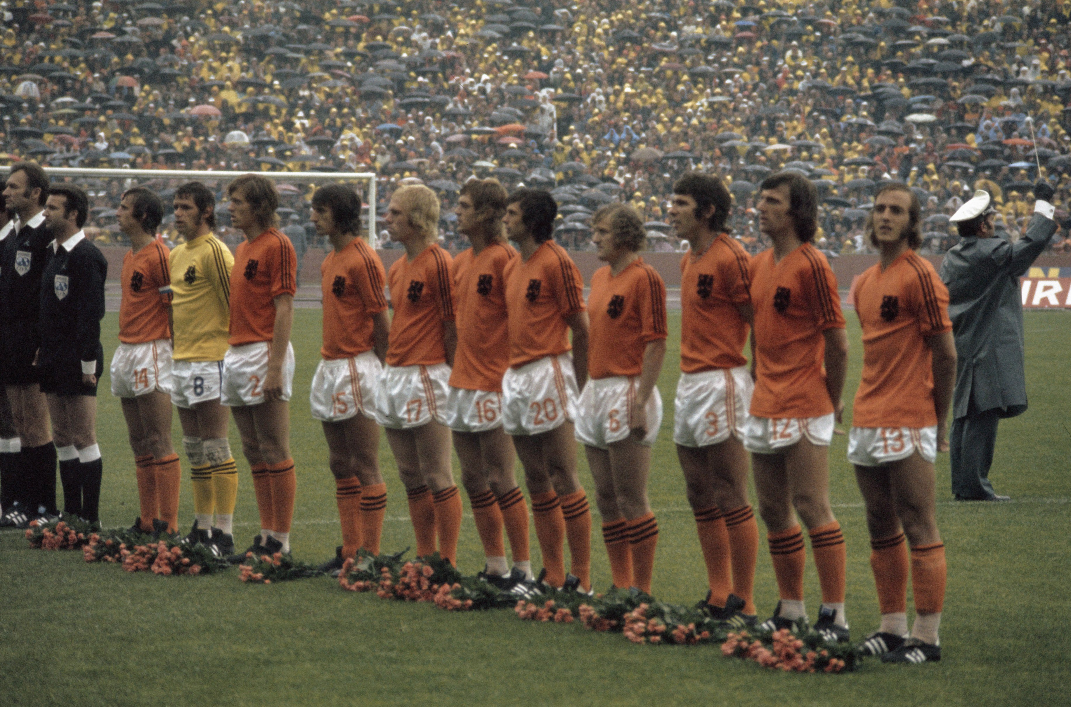 Collectie / Archief : Fotocollectie Anefo Reportage / Serie : [ onbekend ] Beschrijving : Wereldkampioenschap Voetbal 1974 in Munchen, Nederland tegen DDR, 2-0; Nederlands Elftal tijdens Volkslied Datum : 30 april 1974 Locatie : D.D.R., Duitsland, München Trefwoorden : sport, voetbal, wereldkampioenschappen Instellingsnaam : Nederlands Elftal Fotograaf : Verhoeff, Bert / Anefo Auteursrechthebbende : Nationaal Archief Materiaalsoort : Dia (kleur) Nummer archiefinventaris : bekijk toegang 2.24.01.06 Bestanddeelnummer : 254-9511